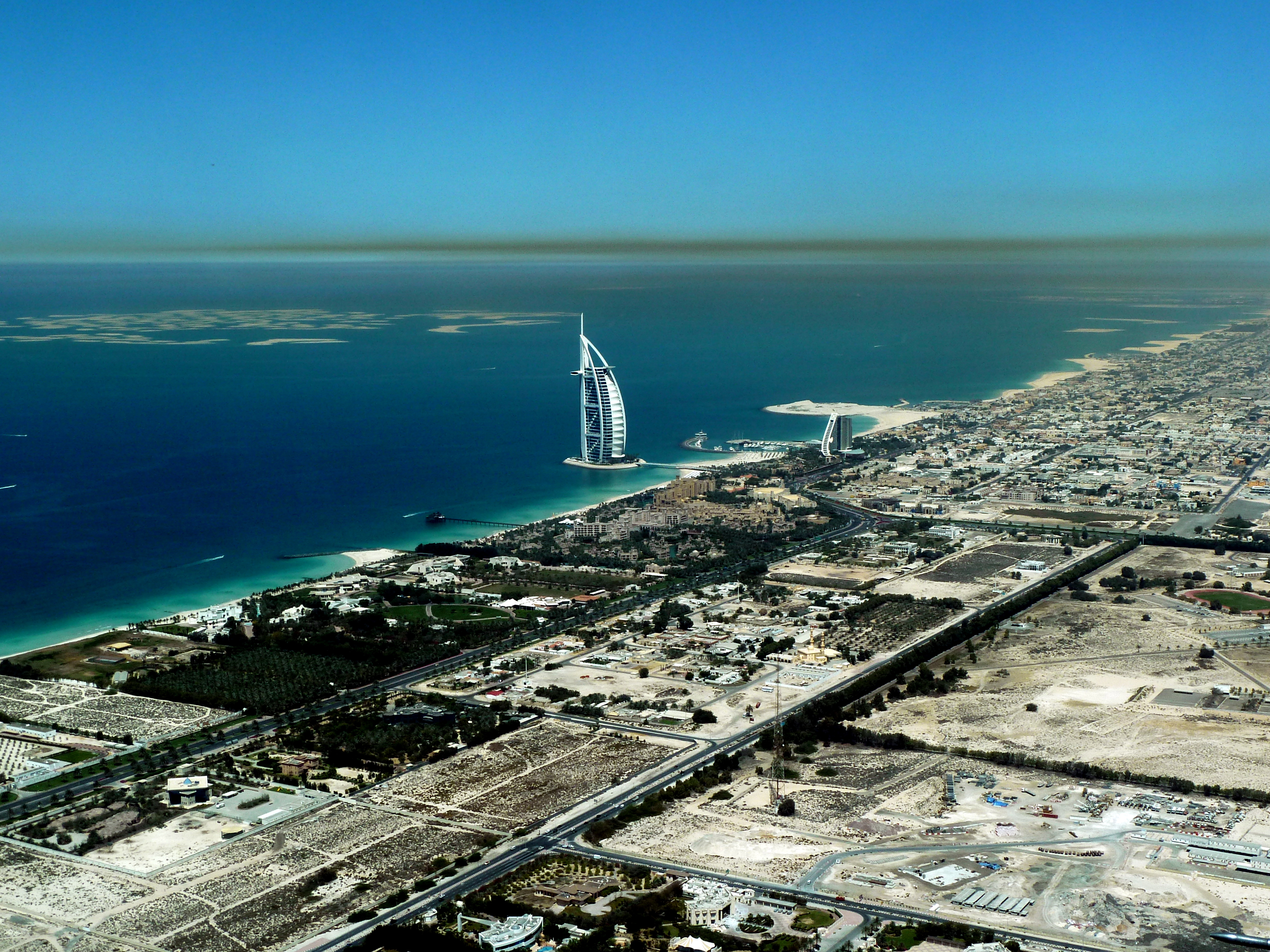 Dubai - Burj Al Arab - Sheikh-Zayed-Road - zwischen Madinat Jumeirah und The World --- ا مدينة جميرا والعالمية